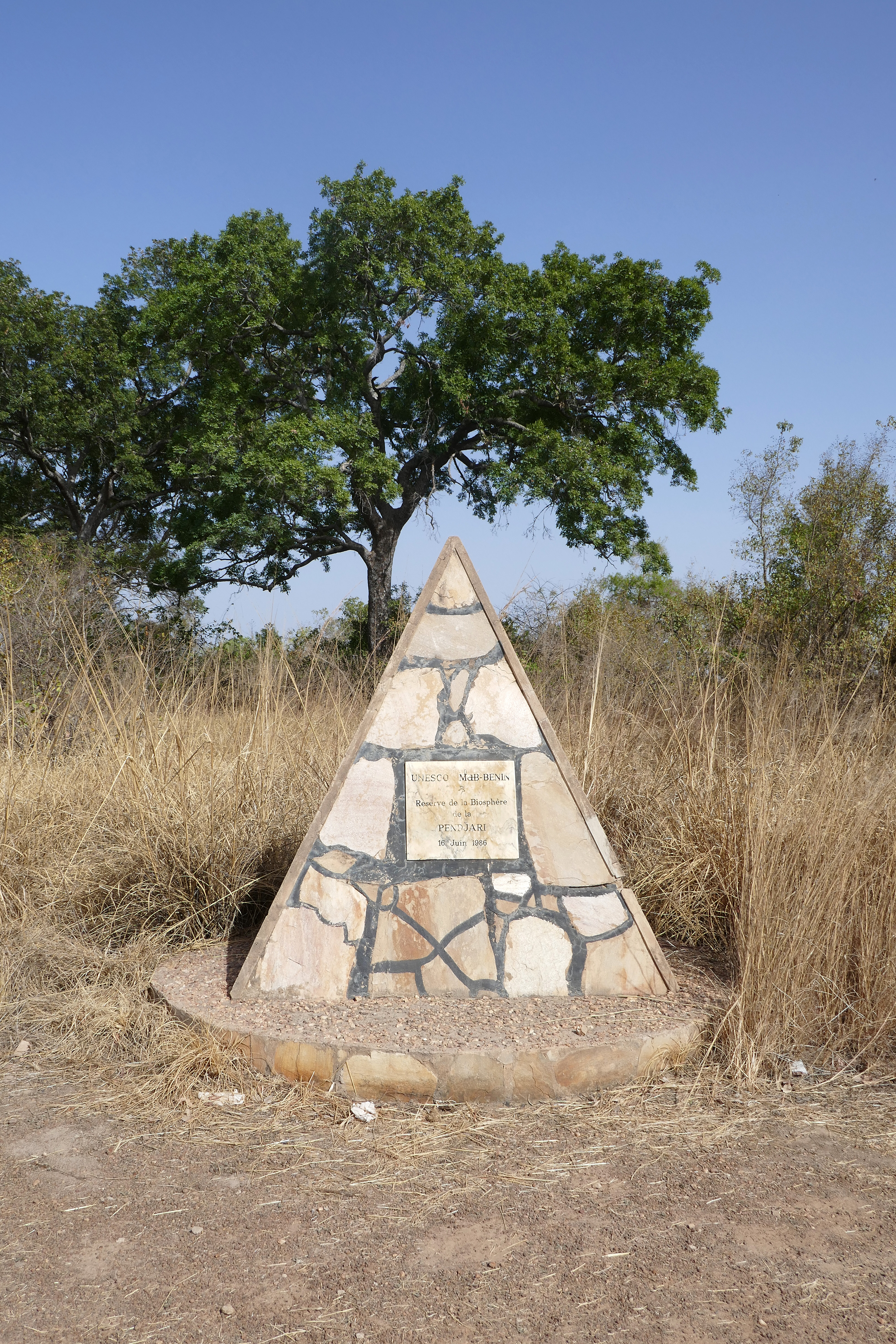 Parc national de la Pendjari (Bénin) : stèle UNESCO, près de la Mare Bali, commémorant la création de la Réserve de la Biosphère de la Pendjari le 16 juin 1986.